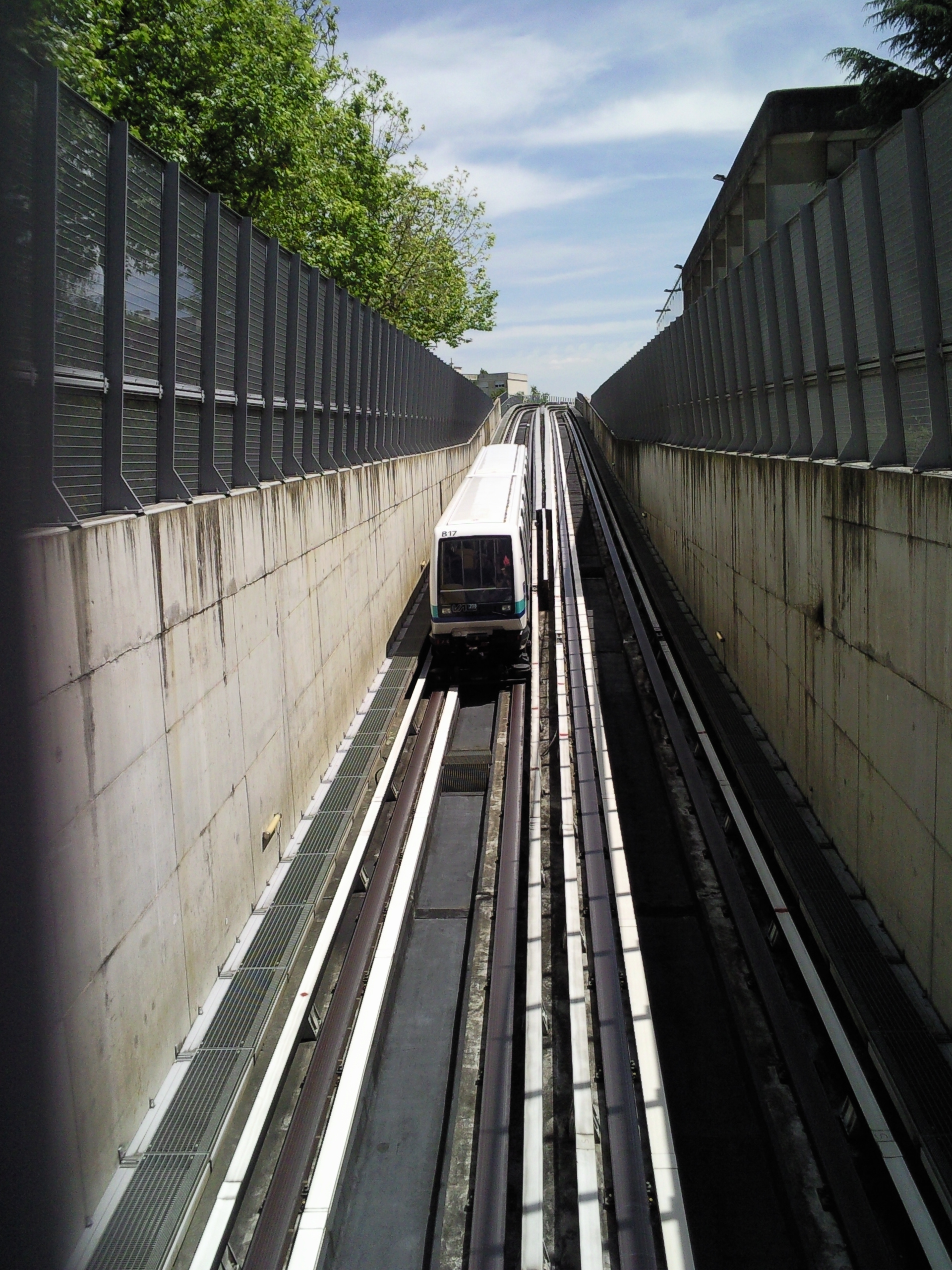 Station de métro Vilejean-Université